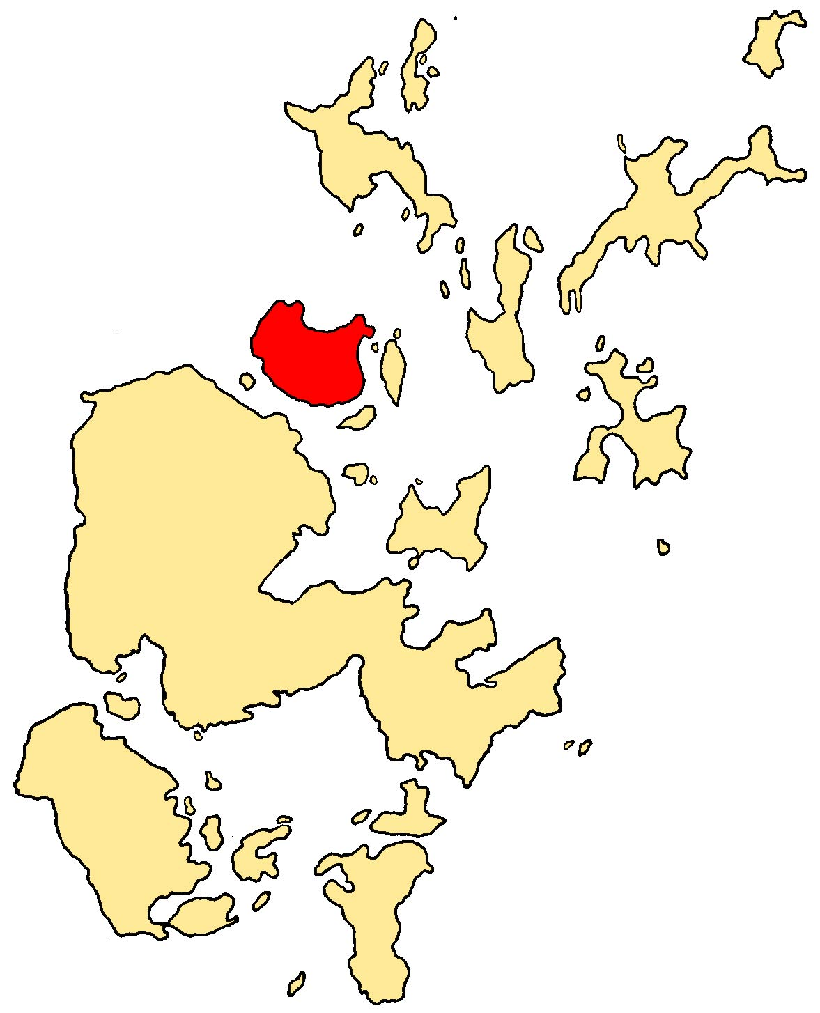 Rausay